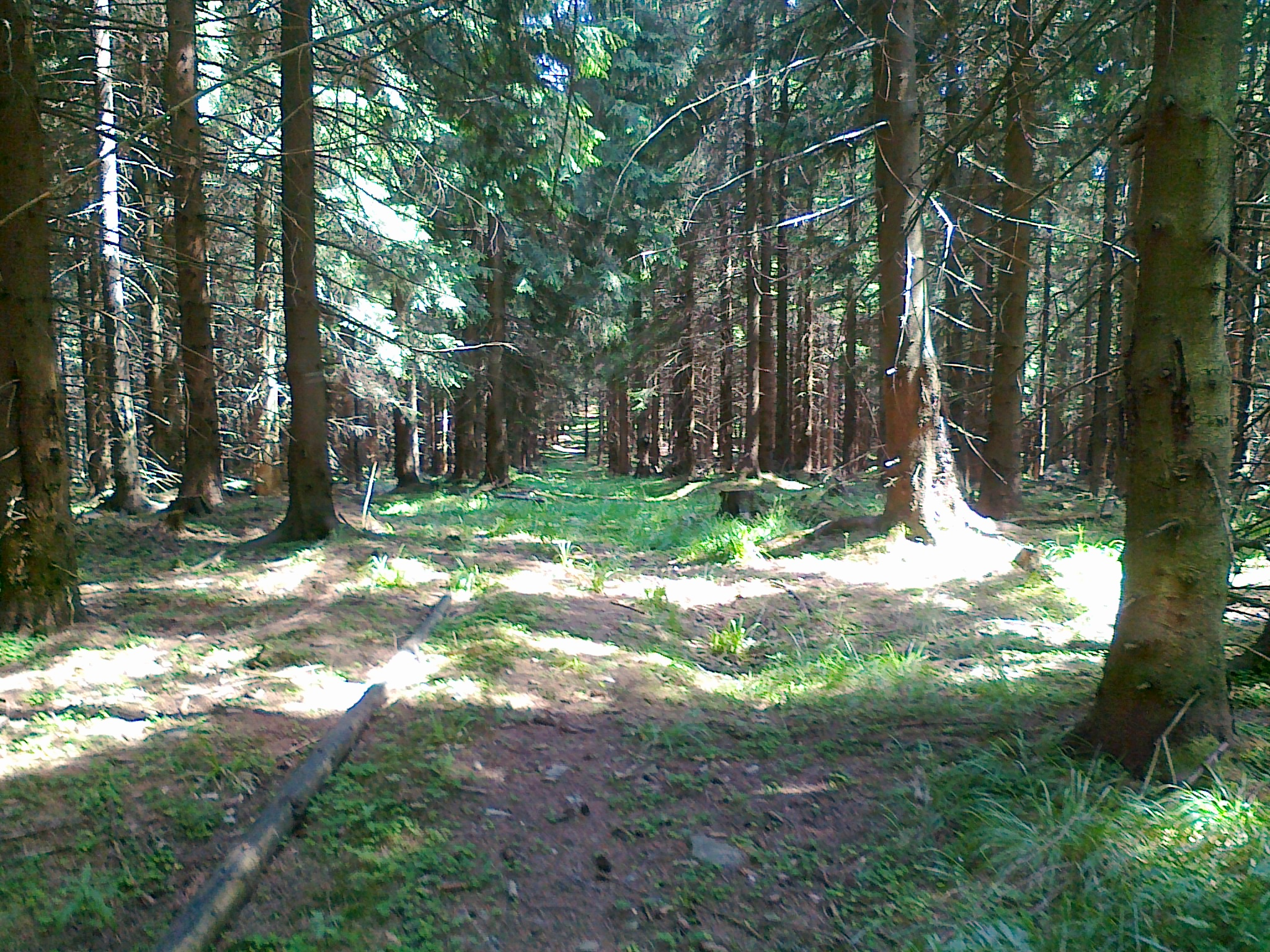 Widok z góry Ostruha na przełęcz w kierunku góry Ostruha-JV.